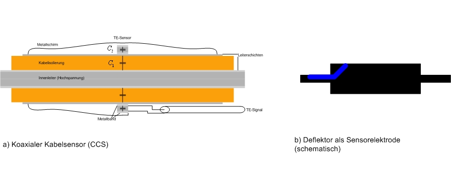 Schematischer Aufbau von Teilentladungssensoren an Hochspannungskabelmuffen